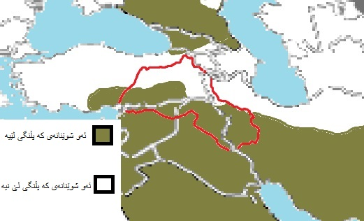 Kurdî: .پڵنگ لە کوردستان